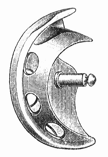 Oszillierender Ringgreifer. für die Näherei oder die Stickerei